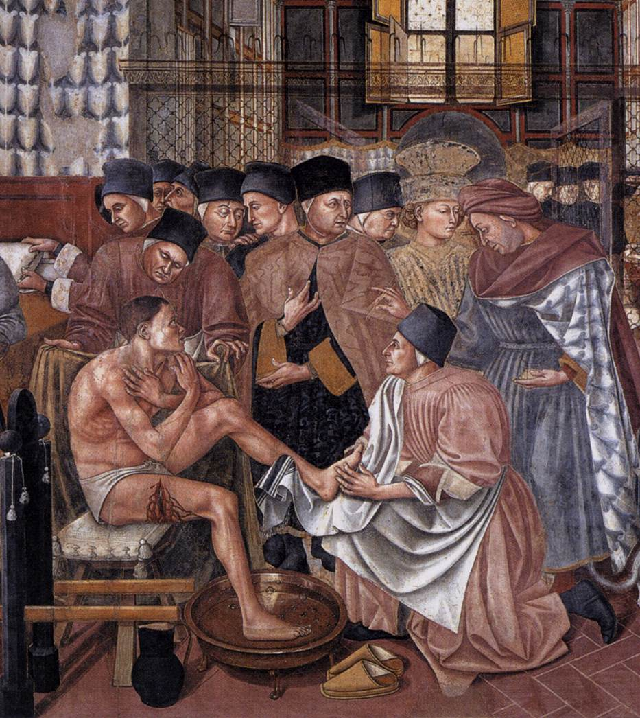 detail